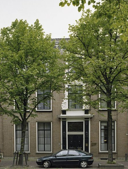 Herenhuis: Overzicht toegangsdeur met pronkrisaliet (opmerking: Gefotografeerd voor Monumenten In Nederland Zuid-Holland)